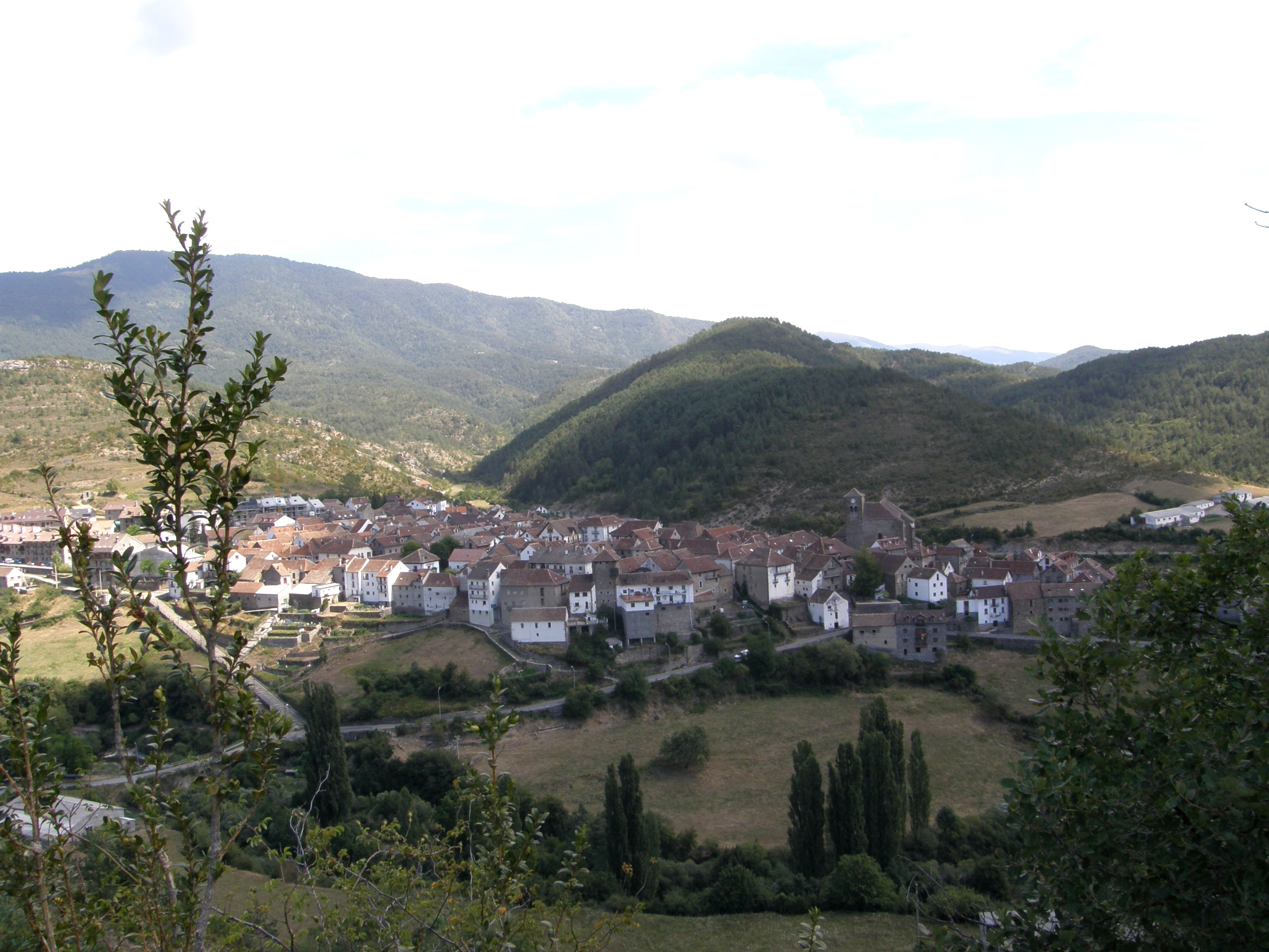 Ansó (Valle de Ansó, Jacetania, Huesca, Zaragoza)